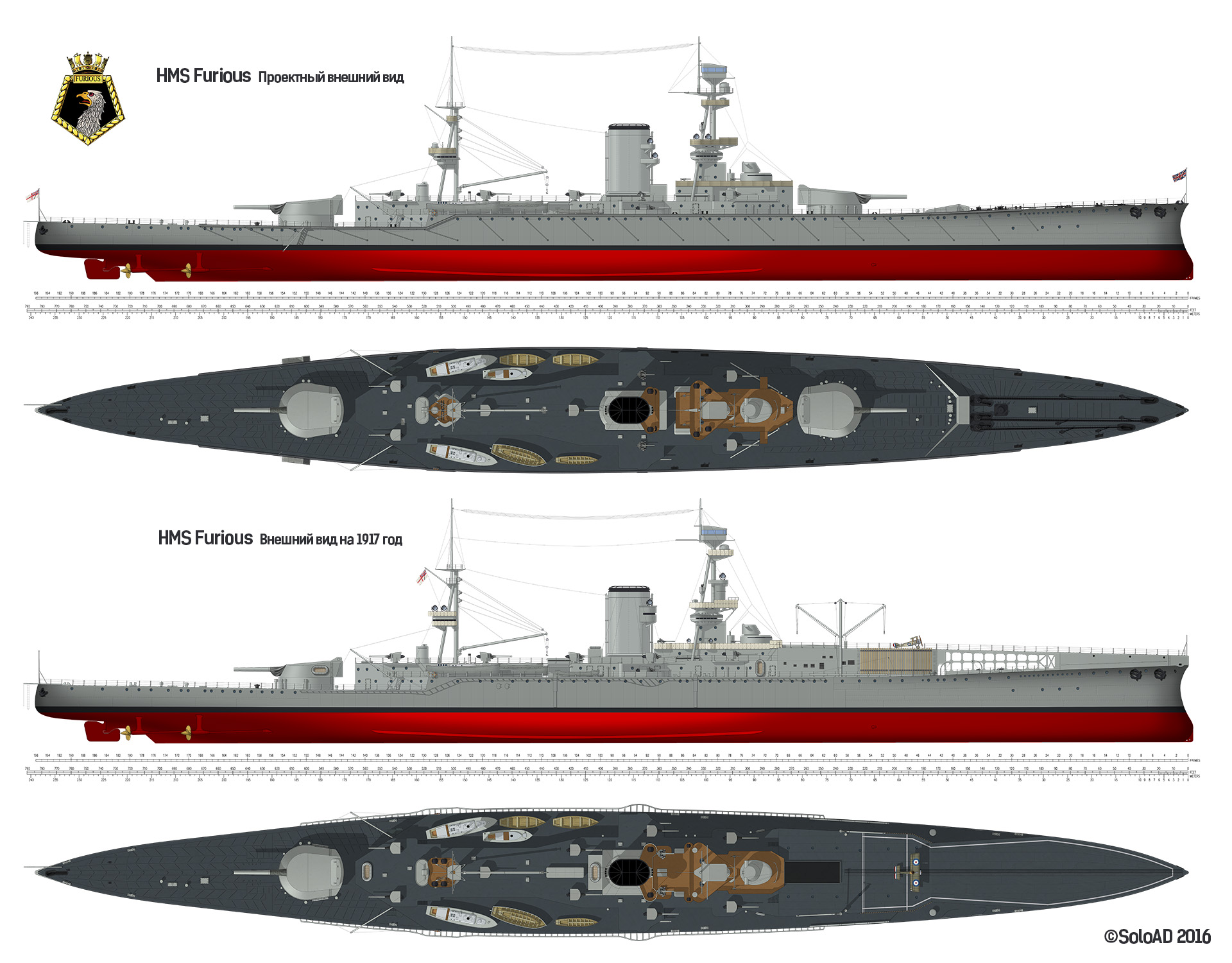 Внешний вид HMS Furious по первоначальному проекту и после первой модернизации